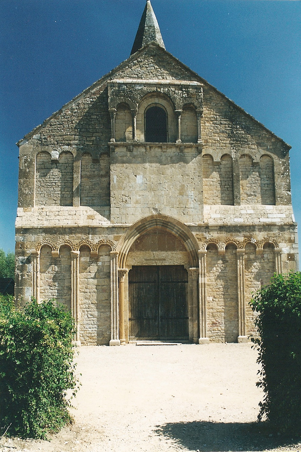 St.-André-de-Bâgé, Fassade frontal